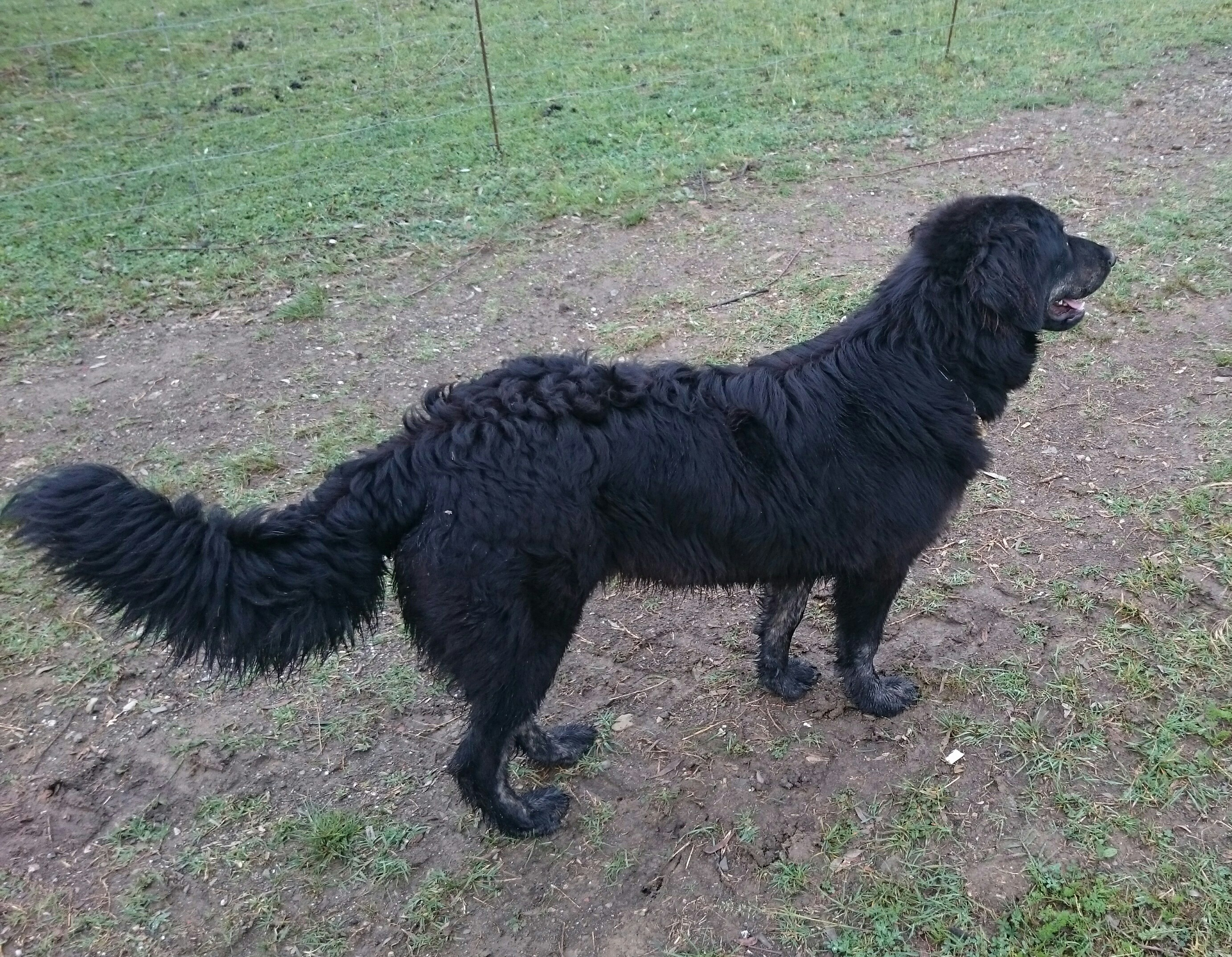 Pastore silano - Cane da pastore silano